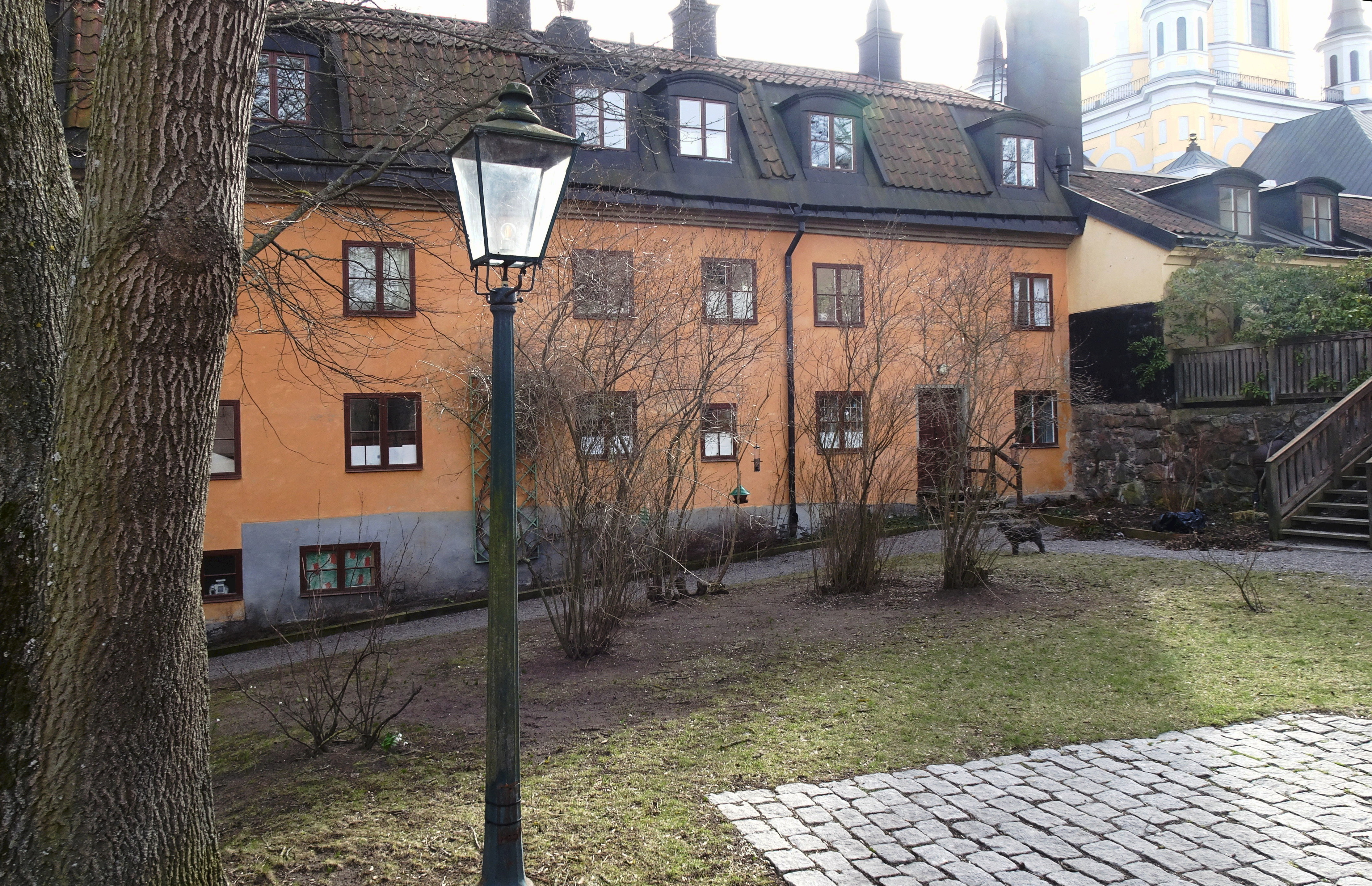 Fastighet Drottningen 4, innergård (länga mot Hötorgsgatan)